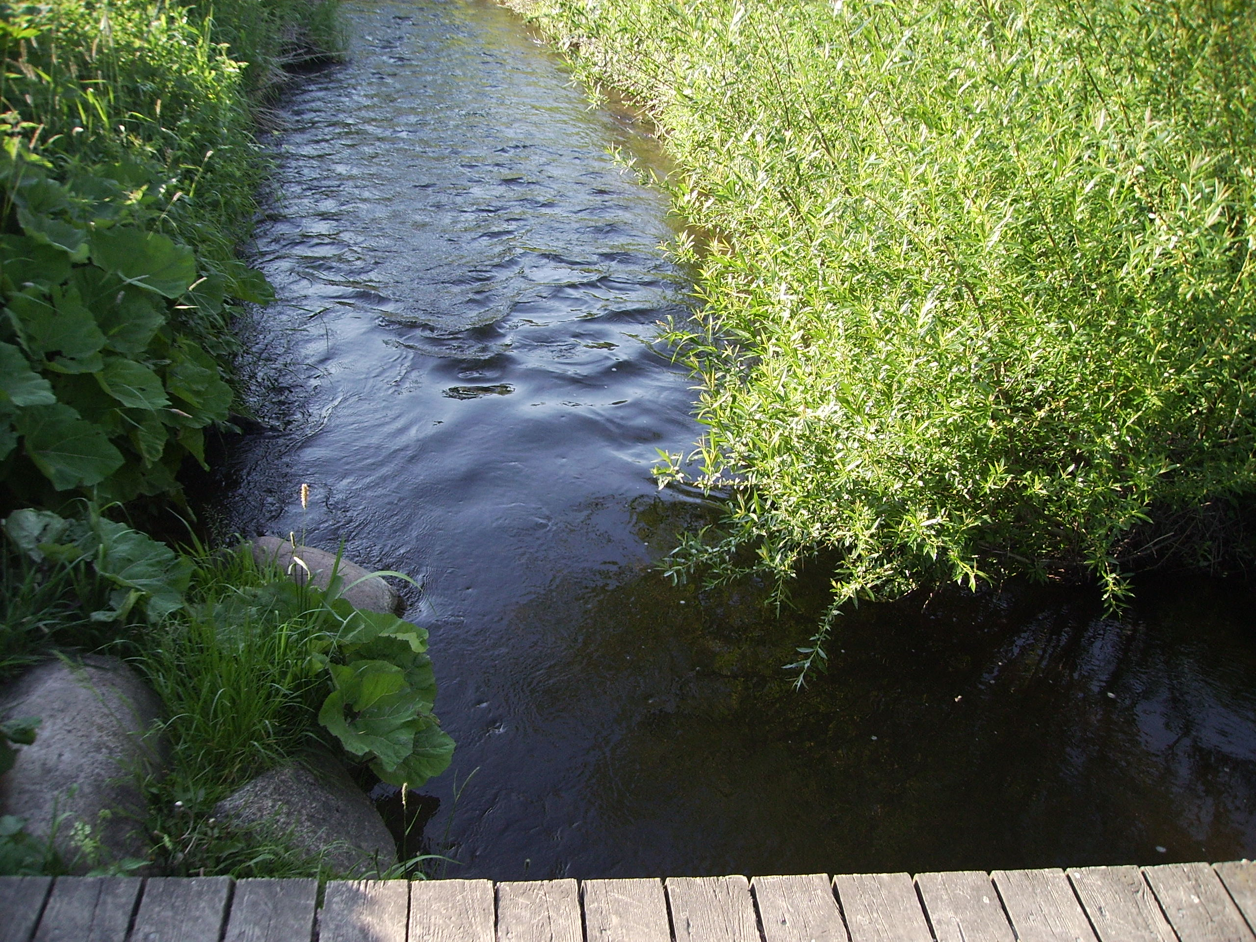 Lindved Å ved Åsum, Åsum Sogn, Åsum Herred, Odense Amt (Danish River)